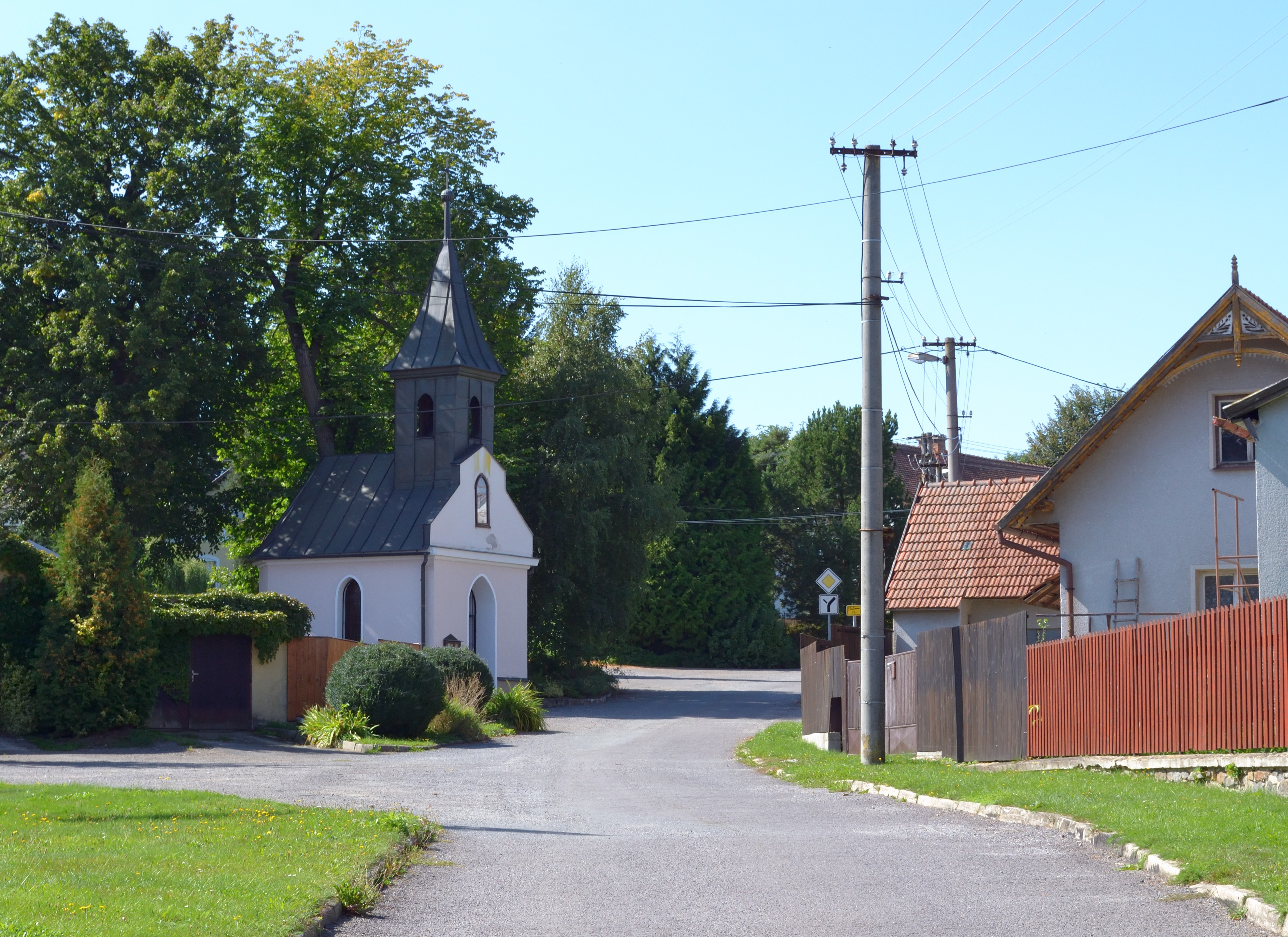 Radenice - kaple sv. Antonína, pohled od J